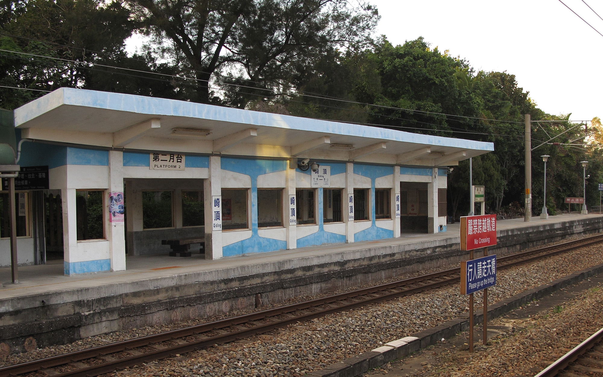 中文（台灣）: 臺灣鐵路管理局崎頂車站第二月台簡易候車區。